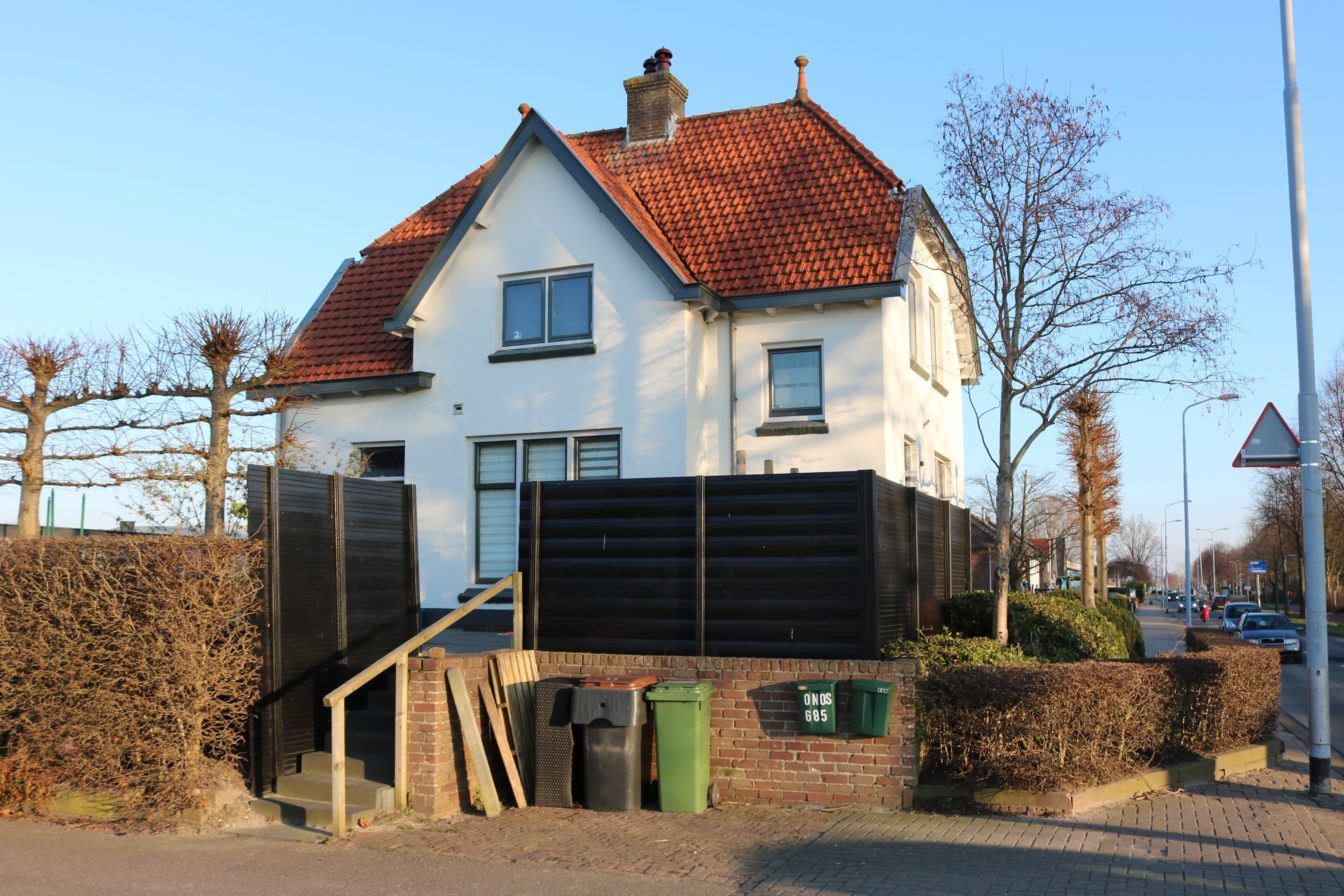 Wachterswoning 18 bij de voormalige stopplaats Venneperweg in Nieuw Vennep, in de spoorlijn van Nieuw Vennep naar Hoofddorp (foto: Daniel van der Ree)